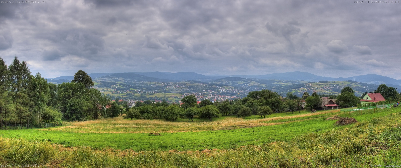 Panorama Limanowej z okolic kempingu koło Łysej Góry Limanowskiej